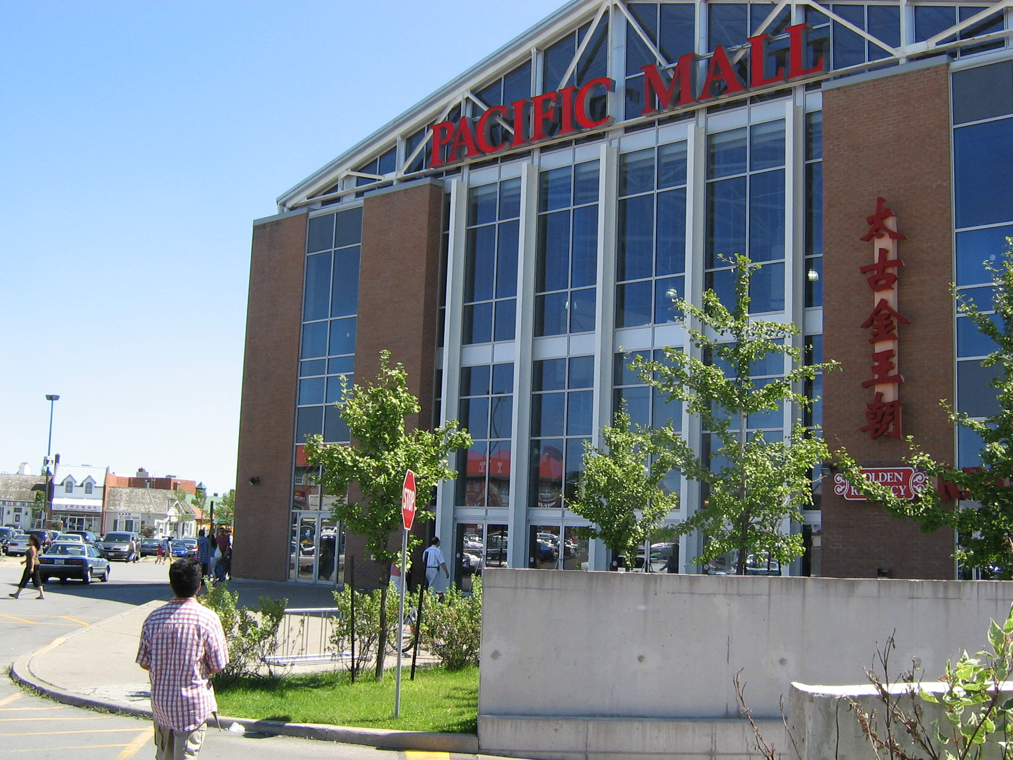 Pacific Mall